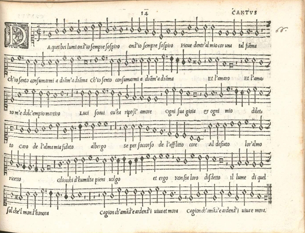 Фрагмент мадригала Киприана де Роре (1544, репринт 1552 г.)